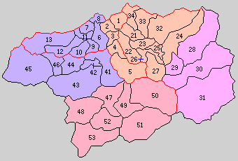 後の鳥取県八頭郡域の町村制時点の町村。